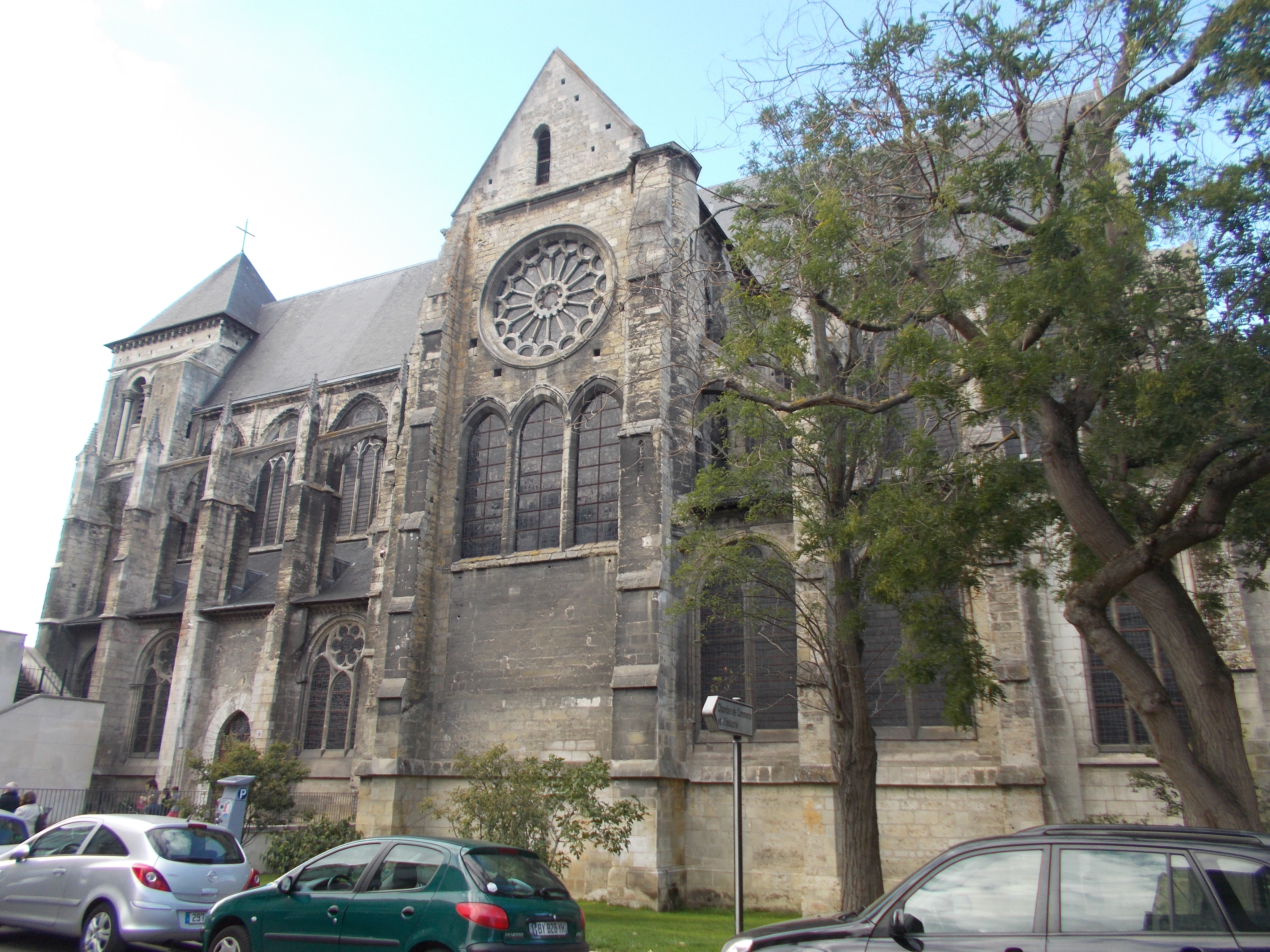 eglise abbatiale Saint-Julien